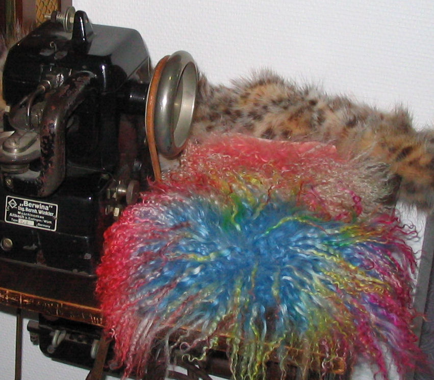 „Berwina“ Pelznähmaschine, Ing. Bernh. Winkler Maschinenbau. Dekorationsstück bei einem Kölner Rauchwarenhändler.